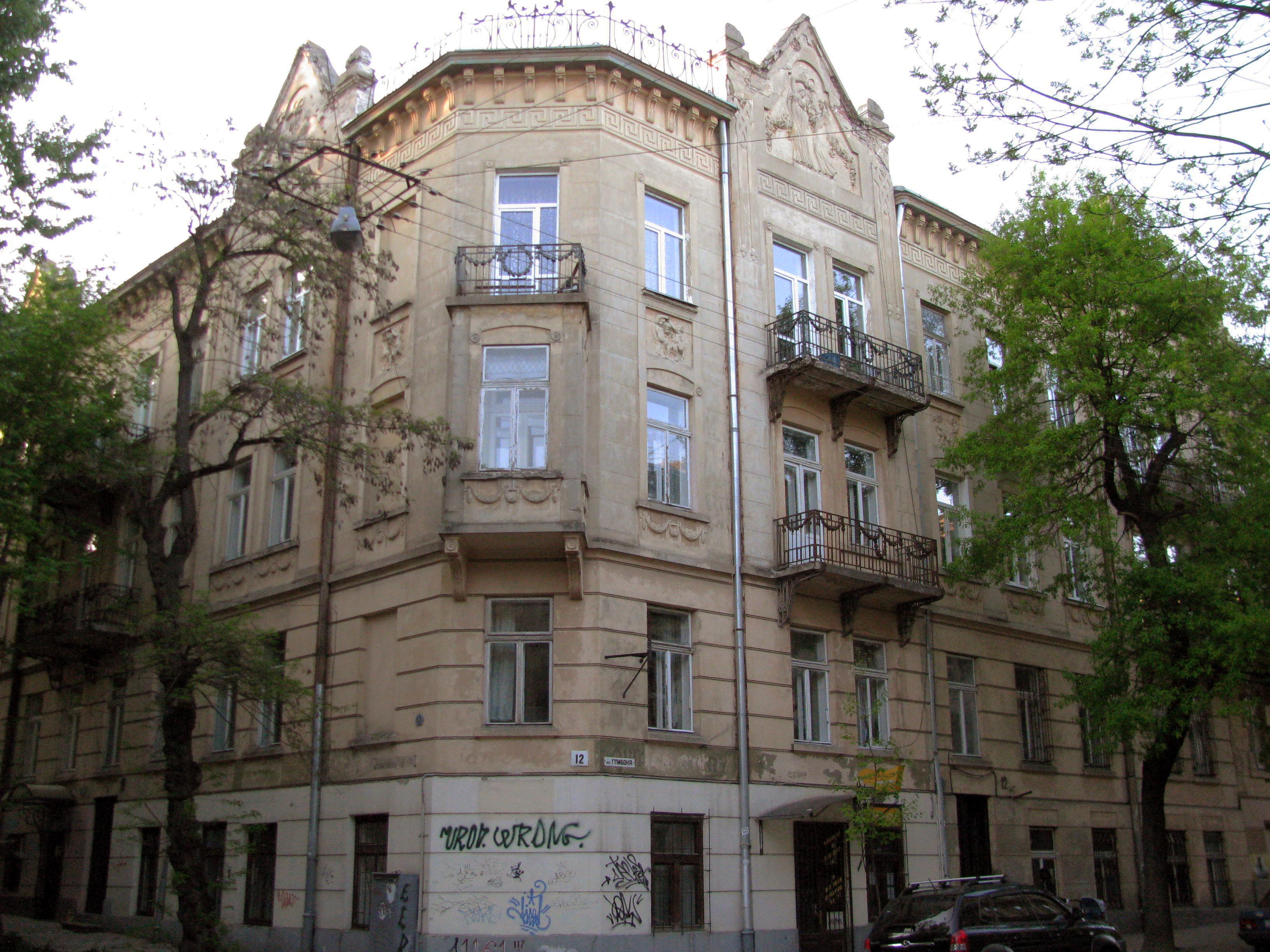 Будинок № 12 на вулиці Глибокій у Львові